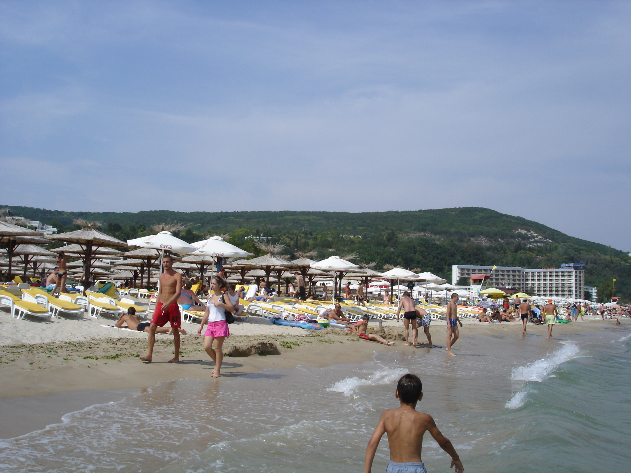 Beach in Albena resort, Bulgaria